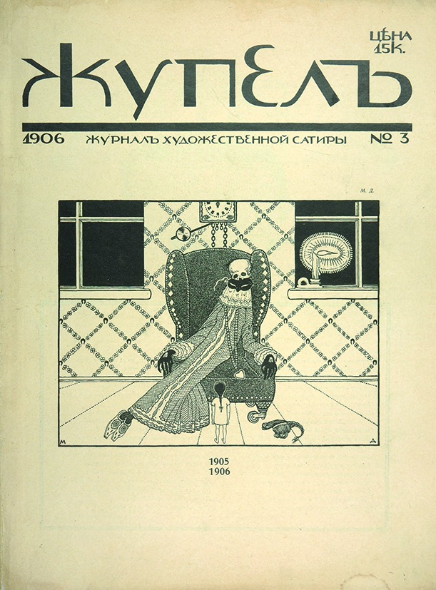 Жупел. Журнал художественной сатиры. № 3 за 1905-1906 гг. СПб.: Тип. Р. Голике и А. Вильборг, 1905-1906.